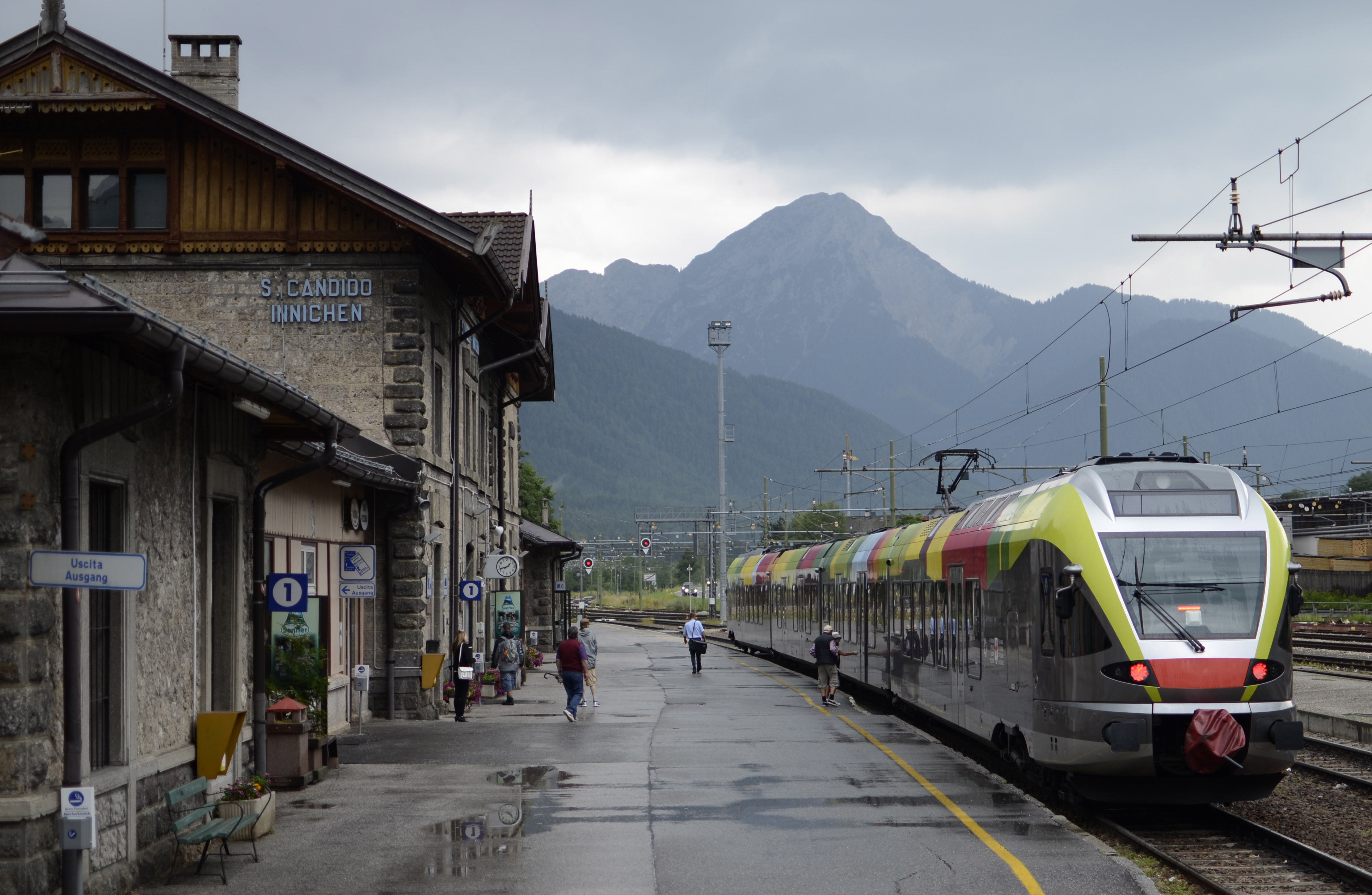 Ein Stadler Flirt der Sad im Bahnhof Innichen